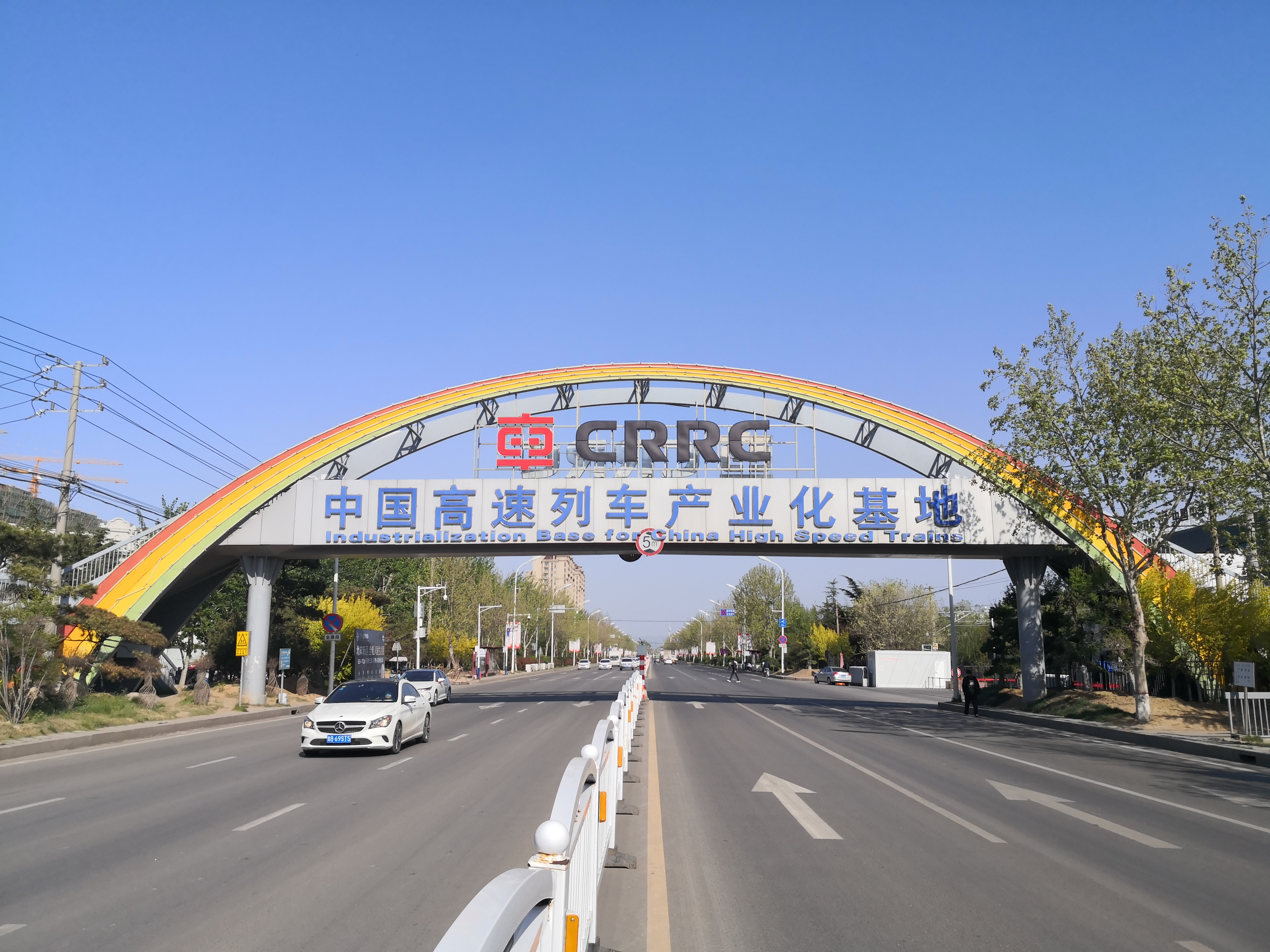 中车青岛四方机车车辆股份有限公司工厂1号门门前的天桥